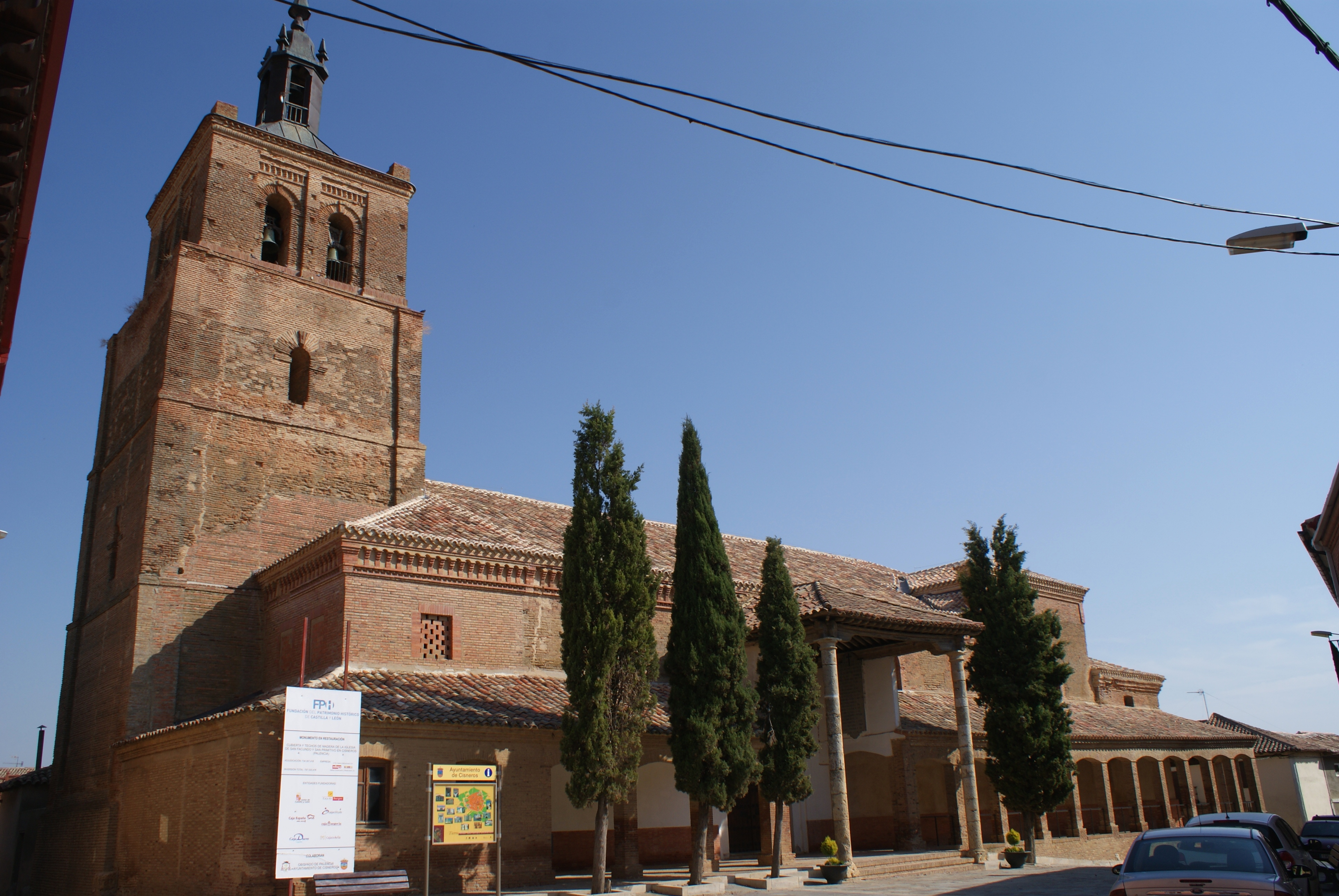 Iglesia de San Facundo y San Primitivo, en Cisneros (provincia de Palencia, España), declarada Bien de Interés Cultural.